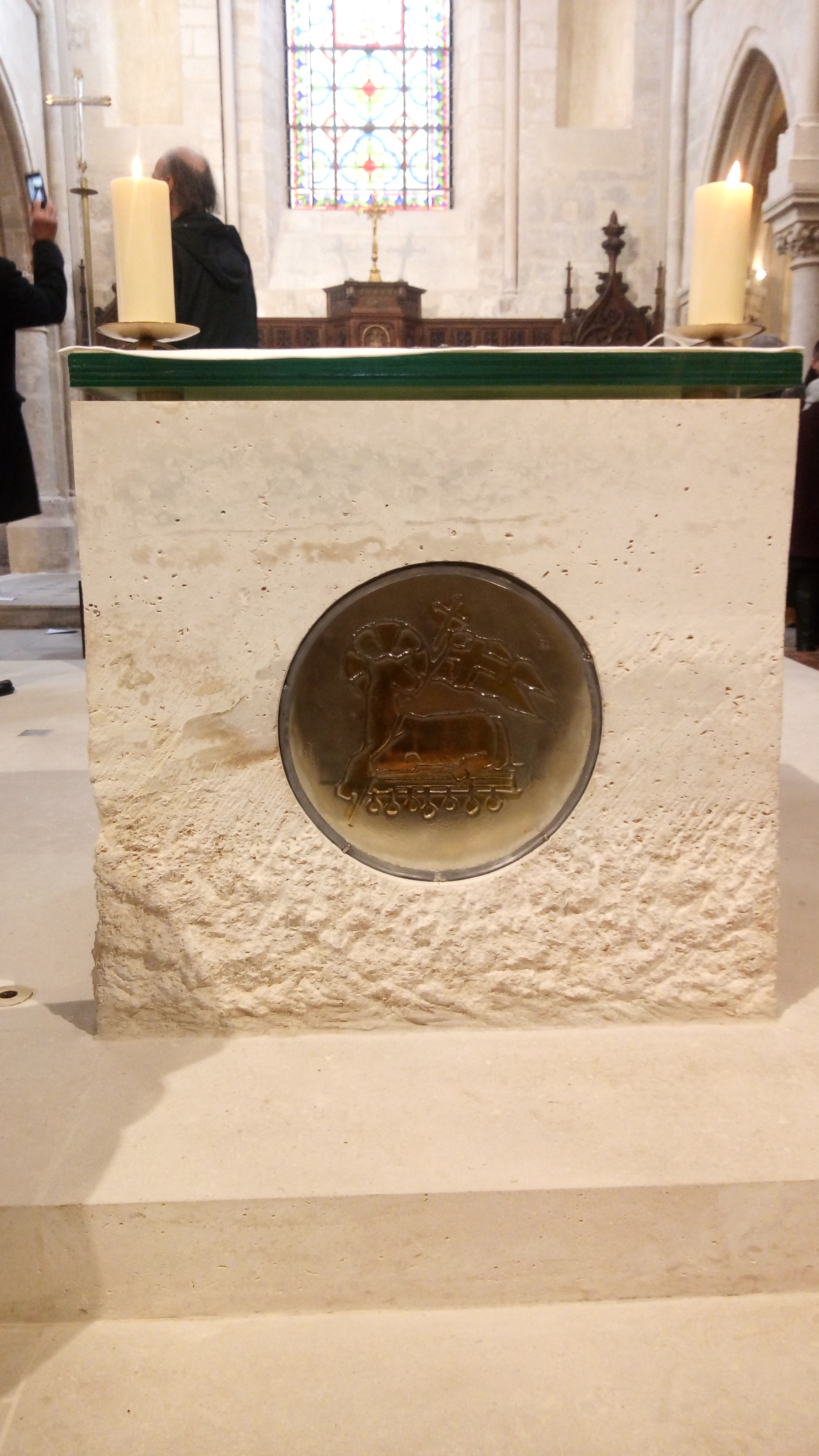 Altar of St Hermelanc church in Bagneux